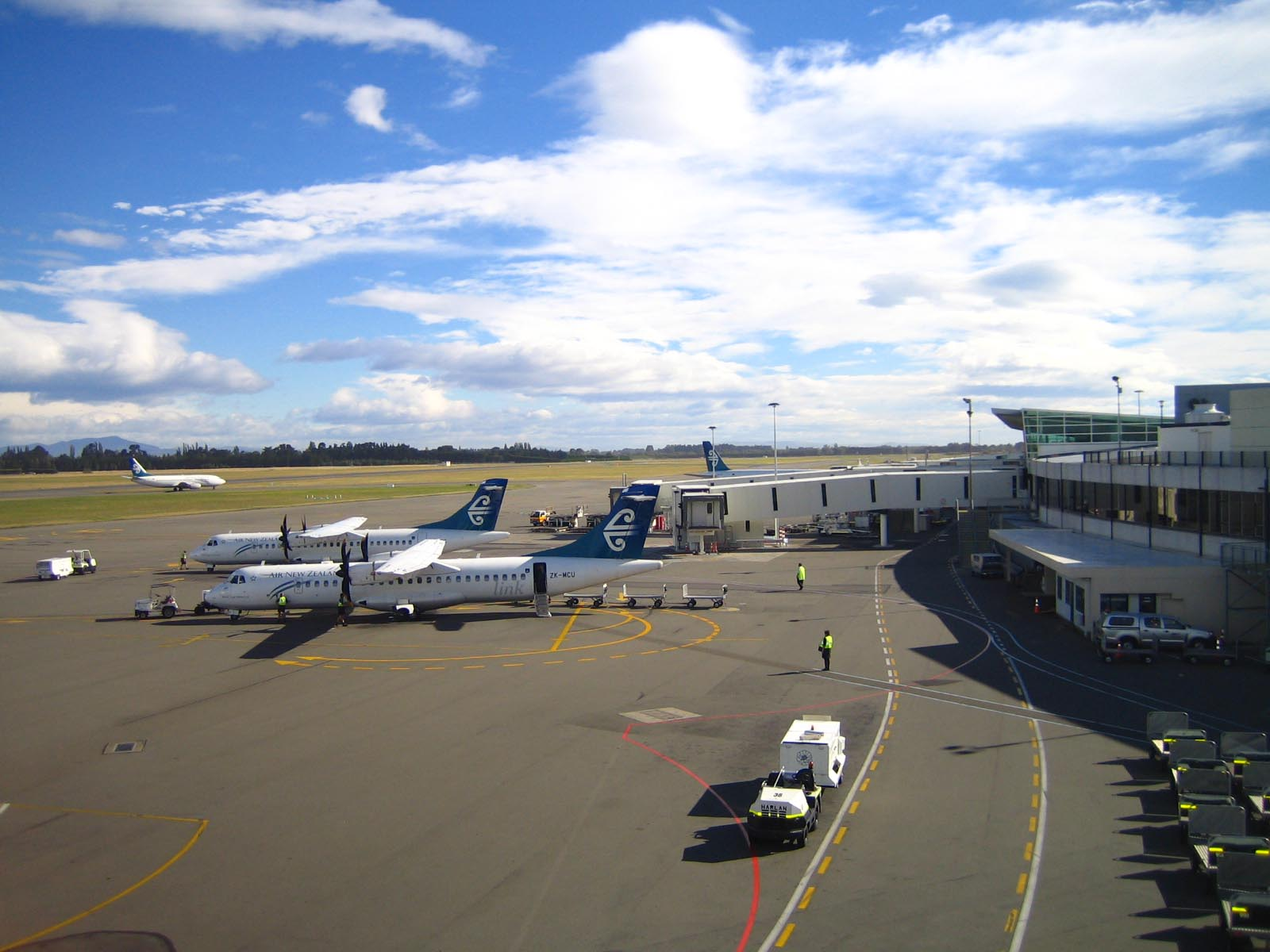 (Photo personnel 2006) Utilisateur:FRED